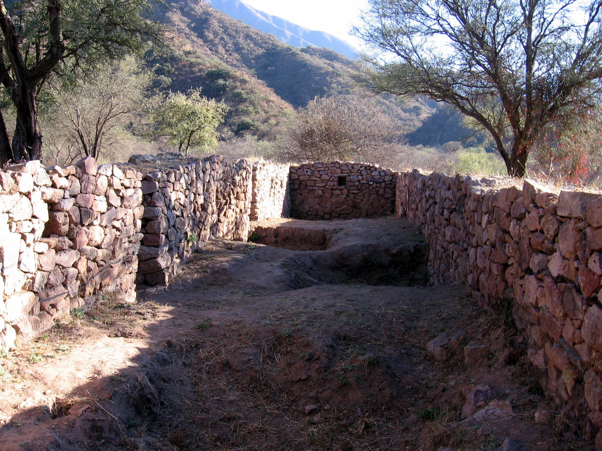 Establecimiento inca El Shincal de Quimivil